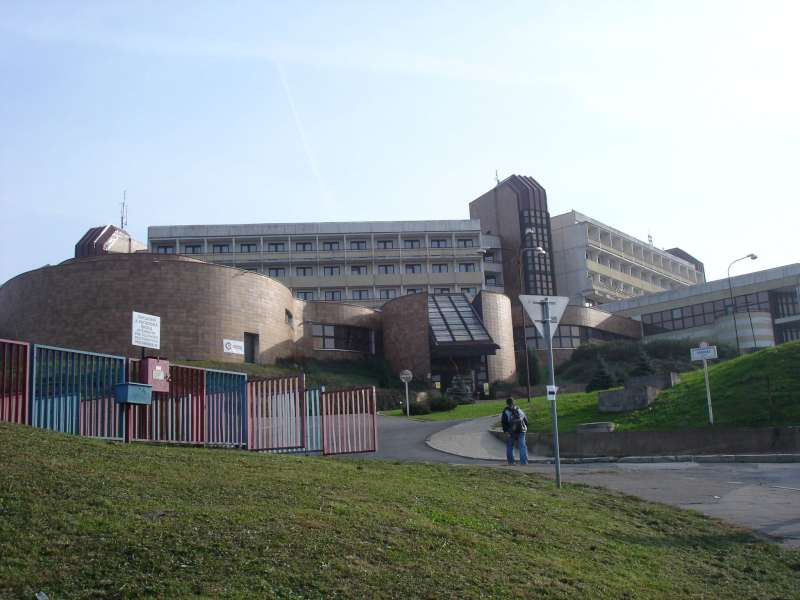 Budova Suzy